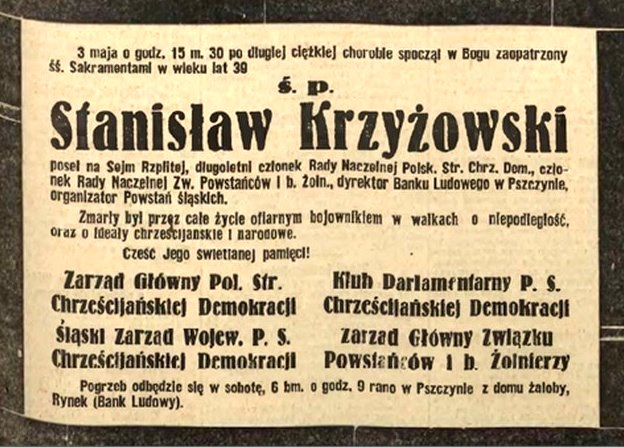 Nekrolog śp. Stanisława Krzyżowskiego